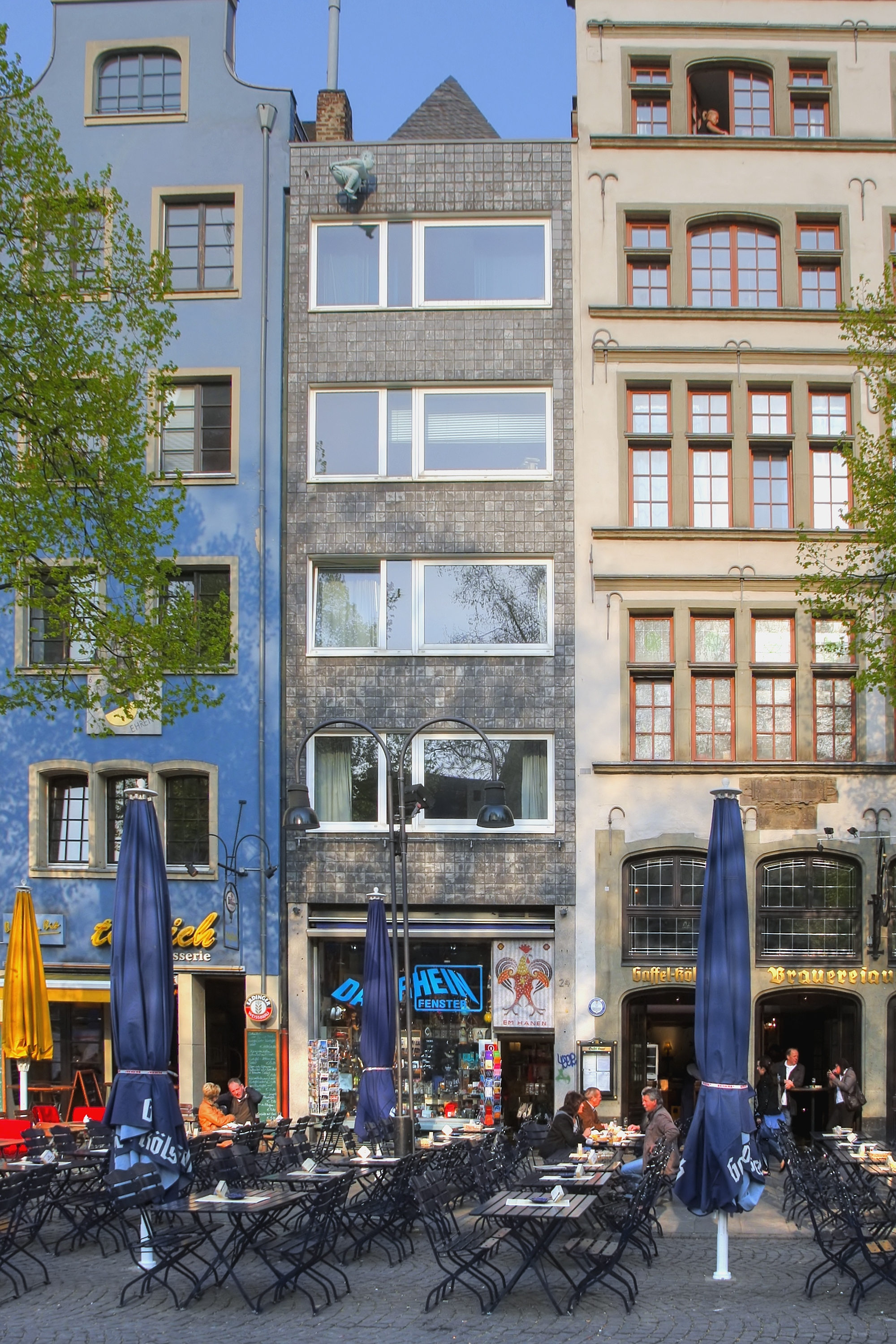 Wohn- und Geschäftshaus „Em Hanen“, Alter Markt 24, Köln. Architekt: Hans Schilling, Hans Spiertz, Baujahr: 1958/59 This is a photograph of an architectural monument.